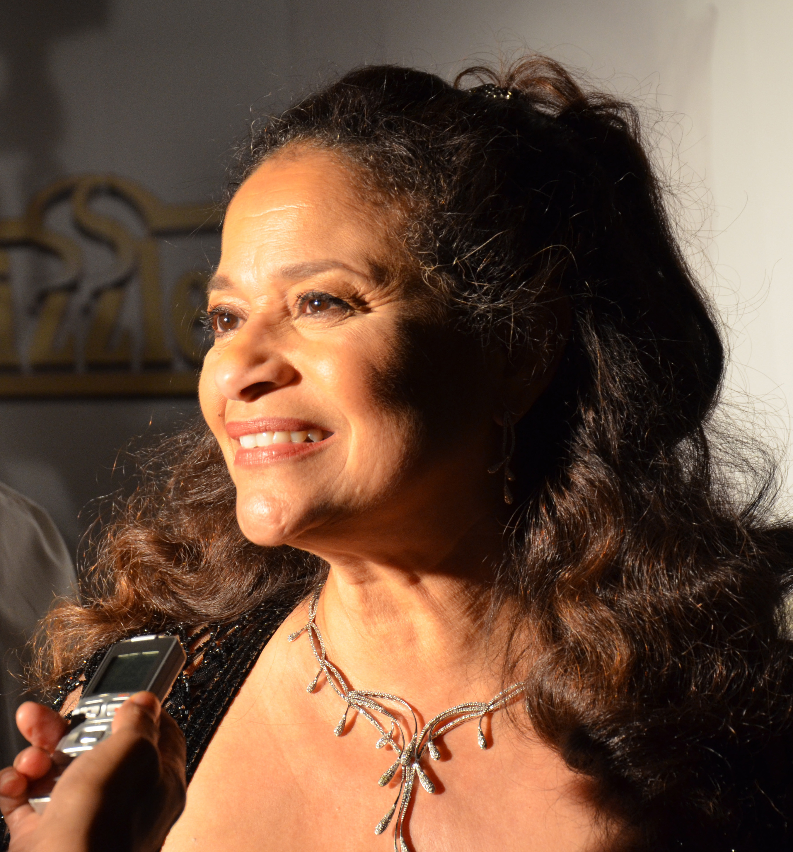 Debbie Allen_2012